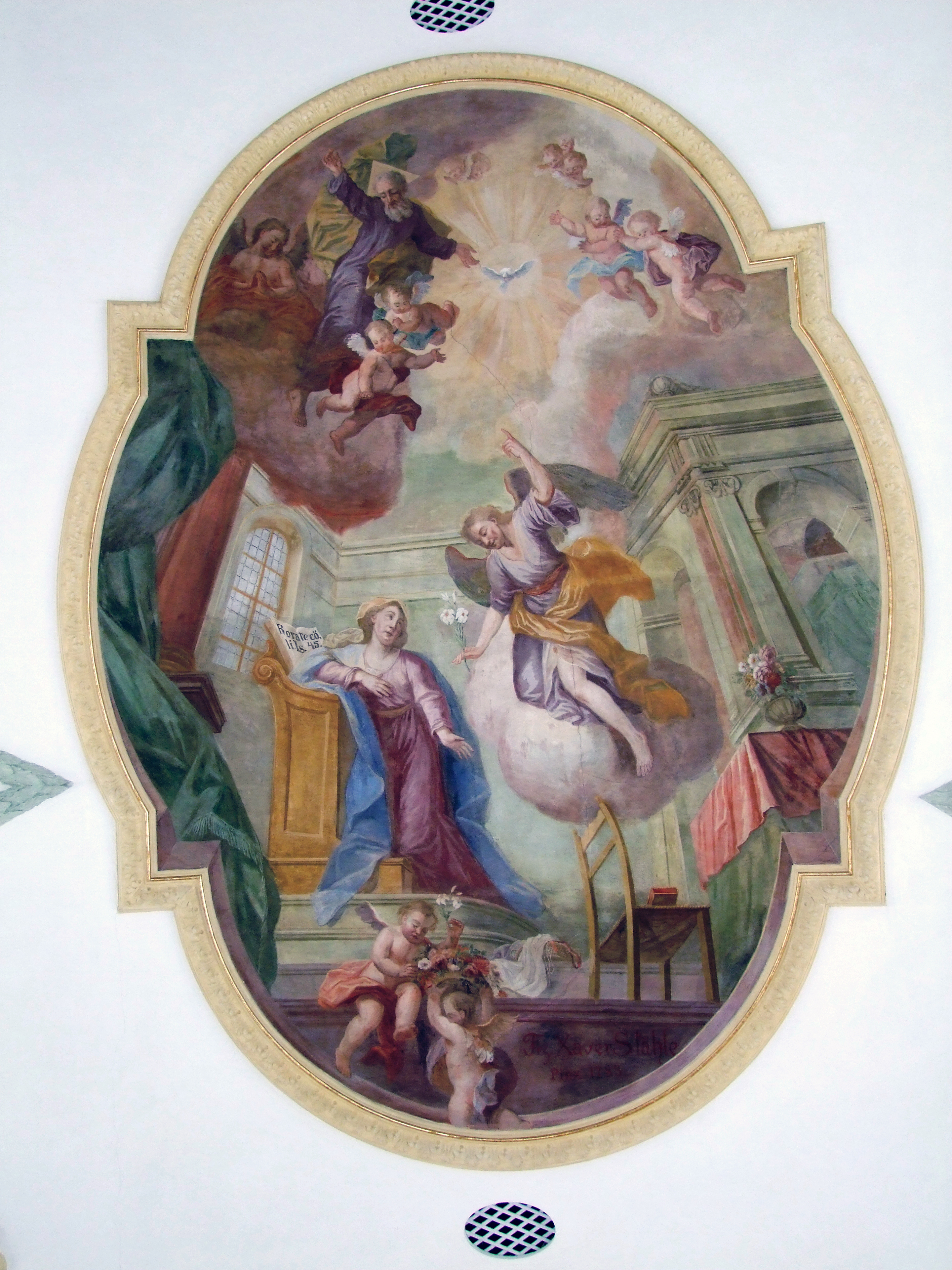 Mariä Himmelfahrt, Pfarrkirche im oberschwäbischen Illerbeuren bei Memmingen